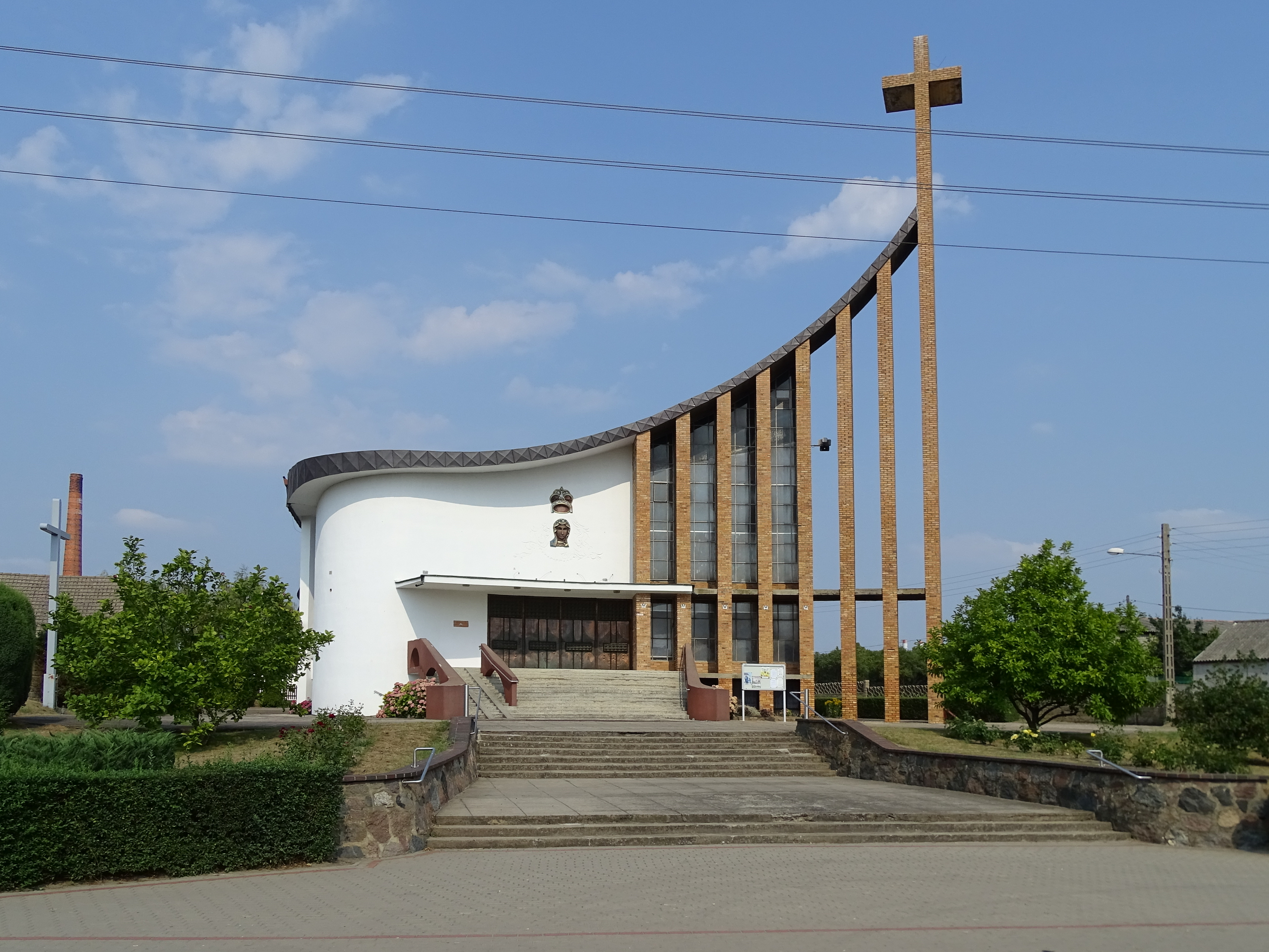 Kościół Matki Boskiej Częstochowskiej w Pudliszkach